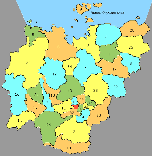 Карта административного деления Республики Саха (Якутия)